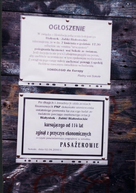 Uroczyste pożegnanie pociągu w Sokolem dnia 2 kwietnia 2000 roku. Tablica ogłoszeń w Sokolem, informująca o smutnej uroczystości pożegnania pociągu i klepsydra, że tą trasą jeździł pociąg przez 114 lat